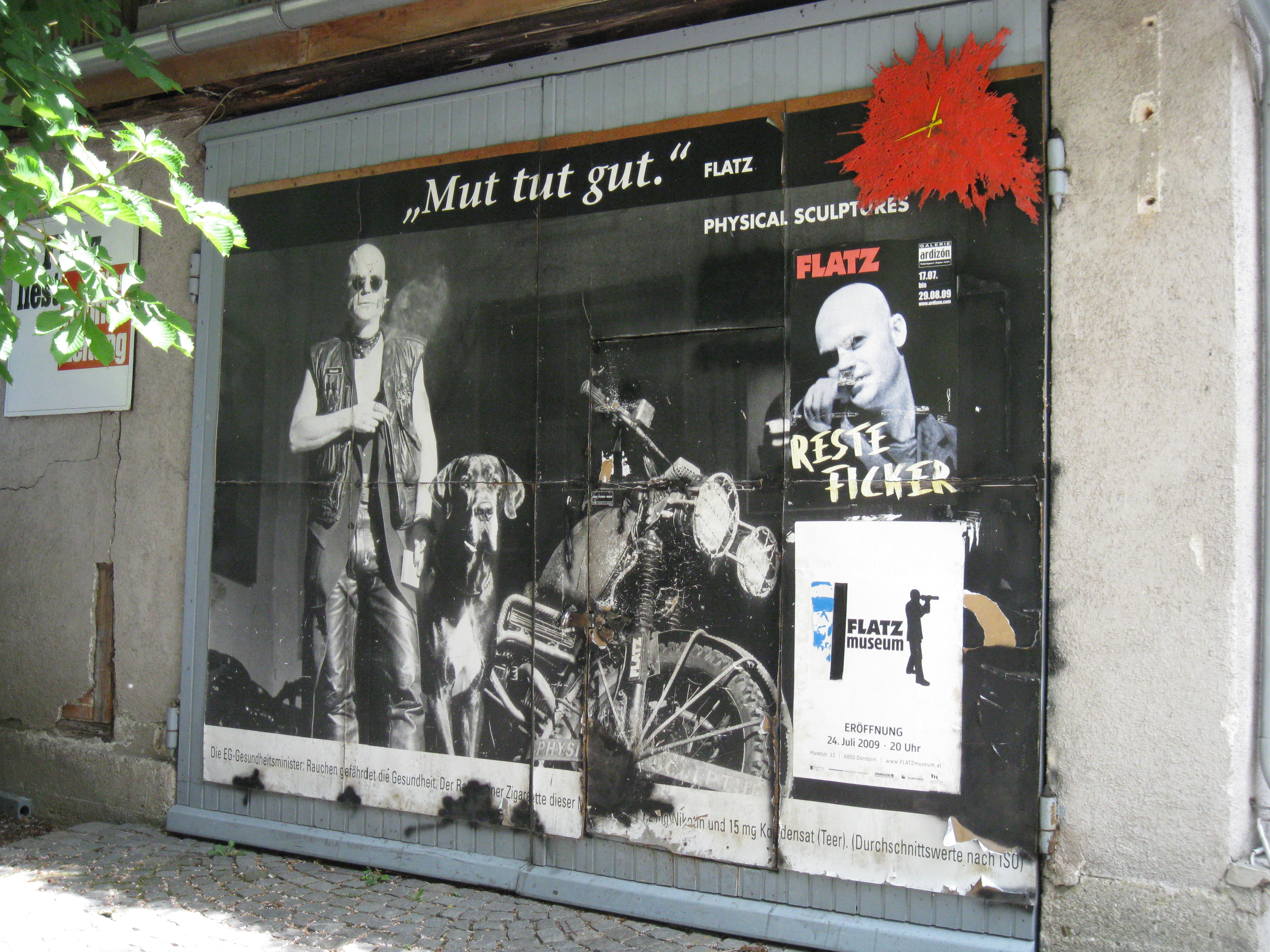 Details vor dem Atelier von Wolfgang Flatz, Praterinsel, München